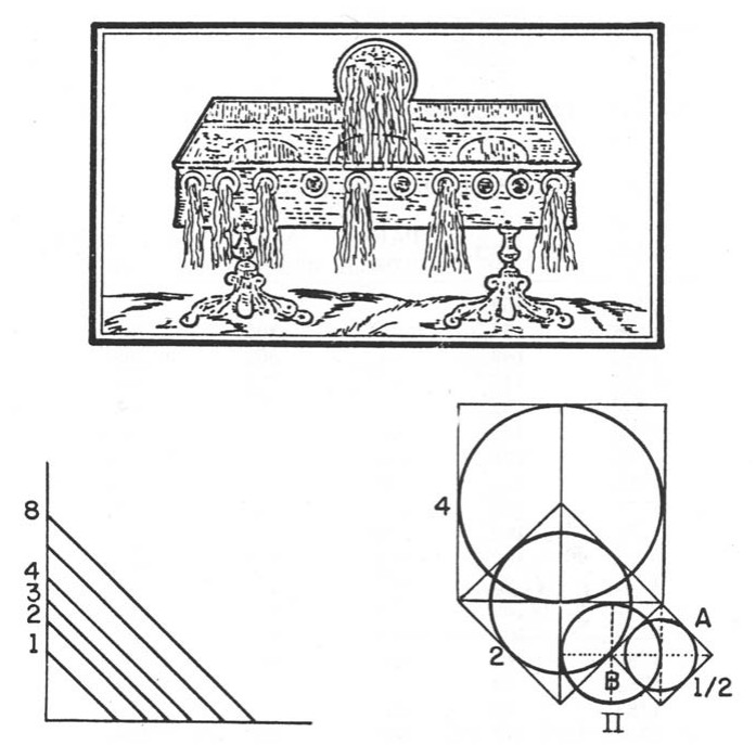 Hidrómetro de Ardemans. Dibujo de 1724.